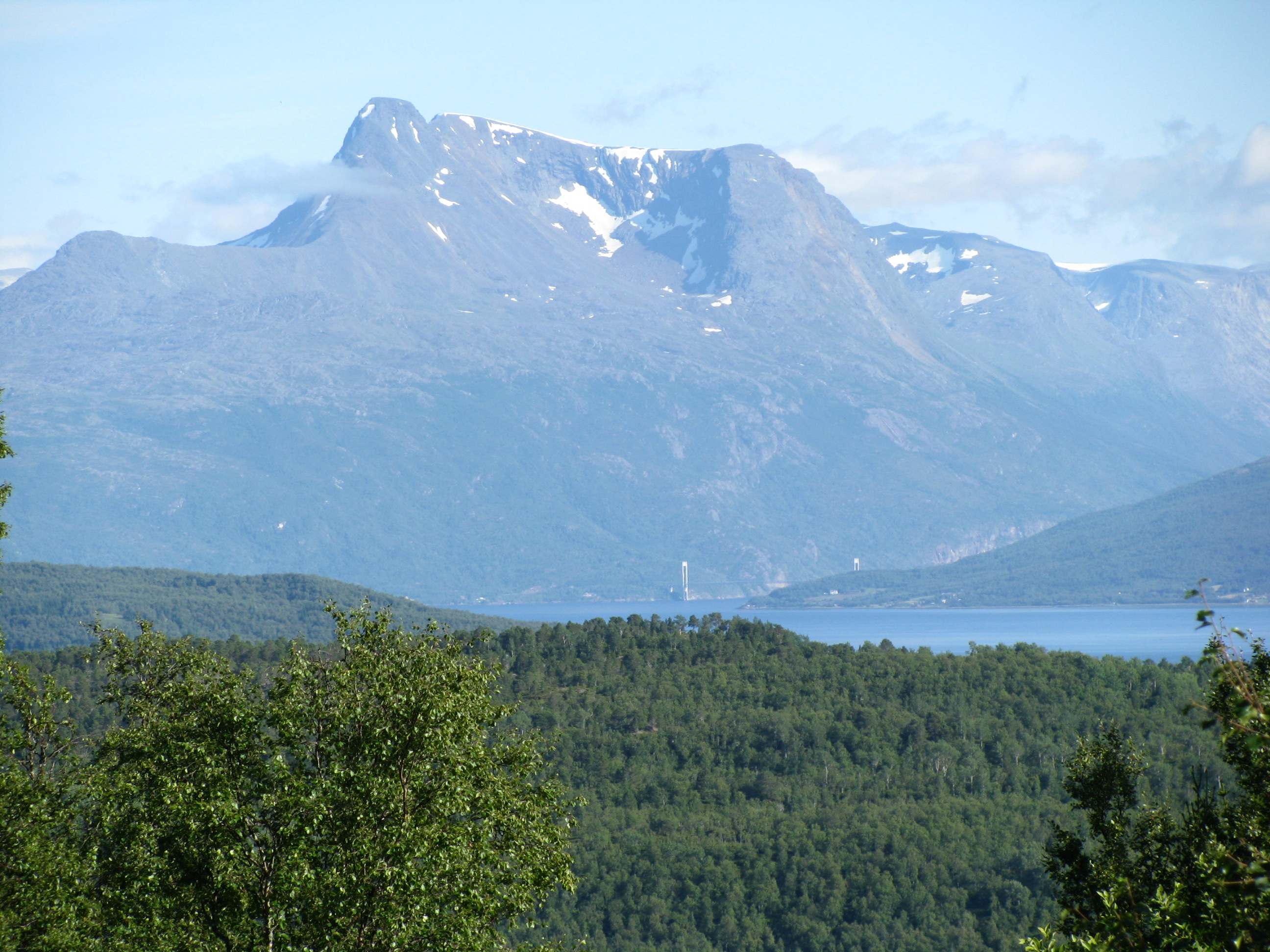 The Kongsbakktinden mountain in Narvik reaching up from Ofotfjord to 1,500 meter above se level. The 700 m long Skjomen Bridge is seen near the base of th mountain. The part of the mountain below the treeline appears green compared to the alpine tundra above. In the foreground the forested hills of the Ofoten landscape, 200 km north of the Arctic Circle, Norway. No: Kongsbakktinden (ca 1500 m høy) i Ofoten, Narvik. Skjomenbrua sees nede ved fjorden, og i forgrunnen Ofotens skogkledde åser.